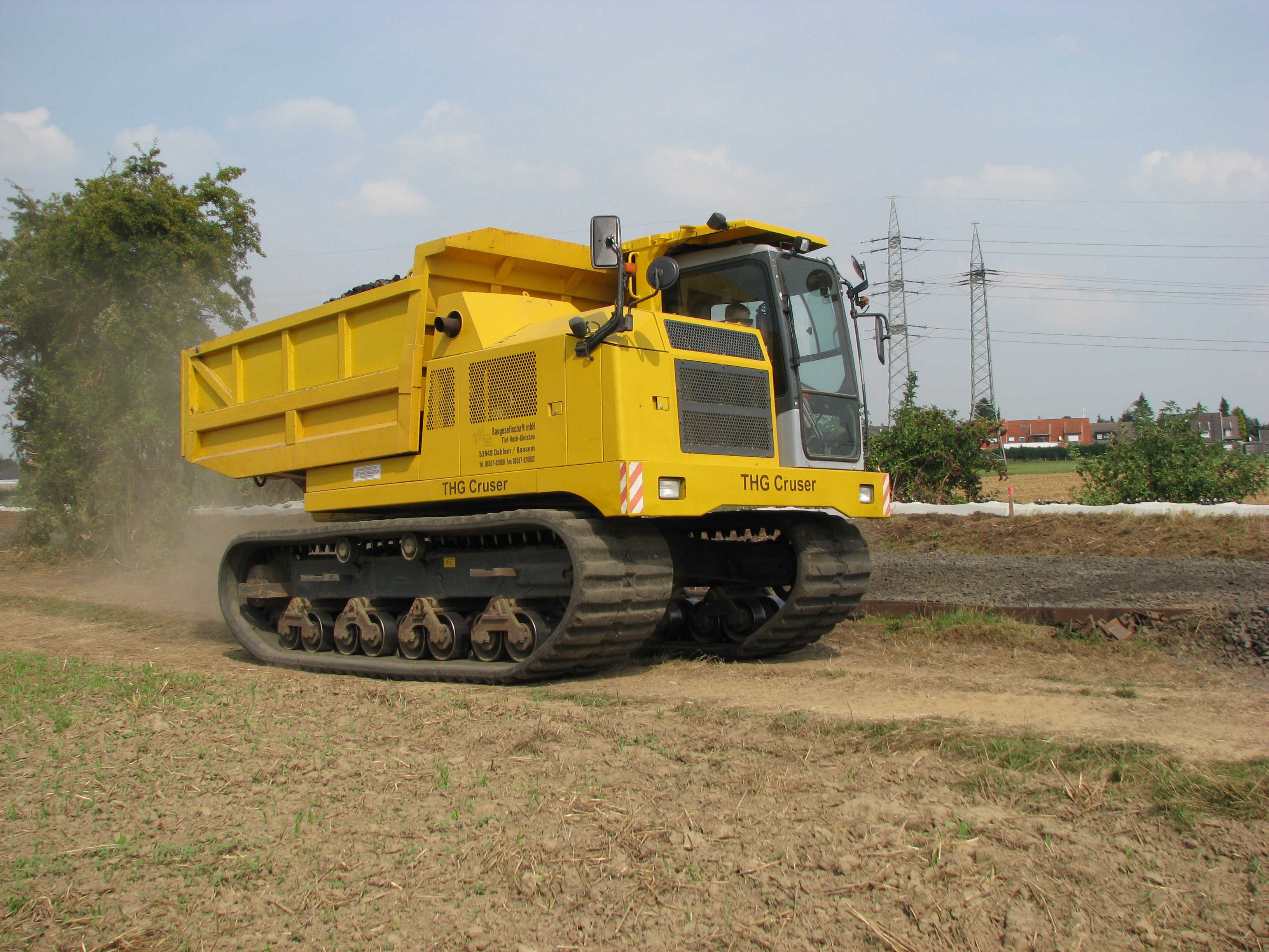 Wiederaufbau der Bahnstrecke Stolberg–Herzogenrath der Euregiobahn in Alsdorf zwischen Alsdorf Poststraße und Eschweiler-St. Jöris. Ein Kettenfahrzeug THG Cruser (Komatsu CD-110R) der Firma THG Baugesellschaft mbH aus Dahlem-Baasem transportiert alten Schotter ab. Hinten Freileitungen (Bl. 2387/110 kV und Bahnstrom)